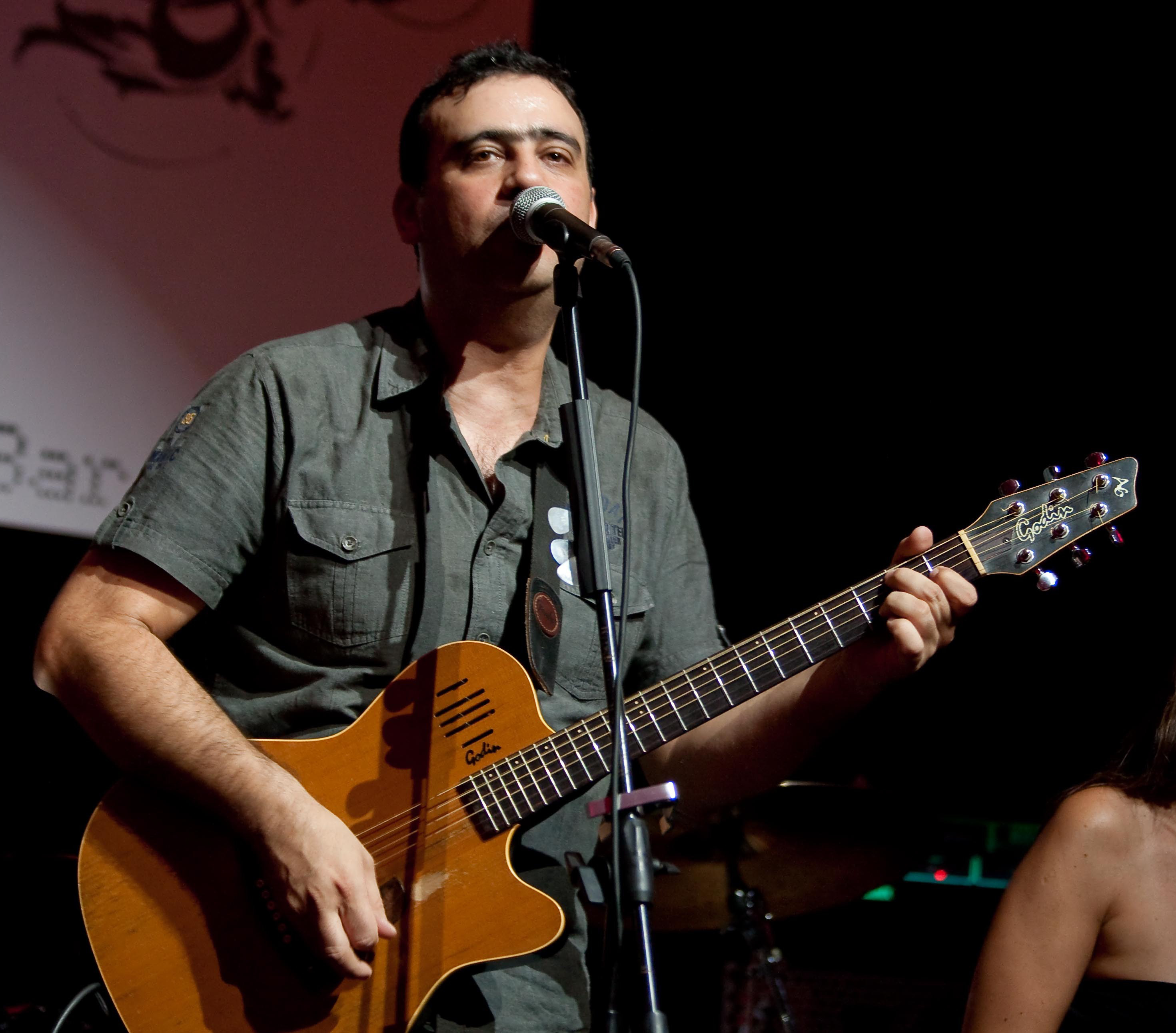 Paulo Brissos na Discoteca OP no Cacem, Portugal